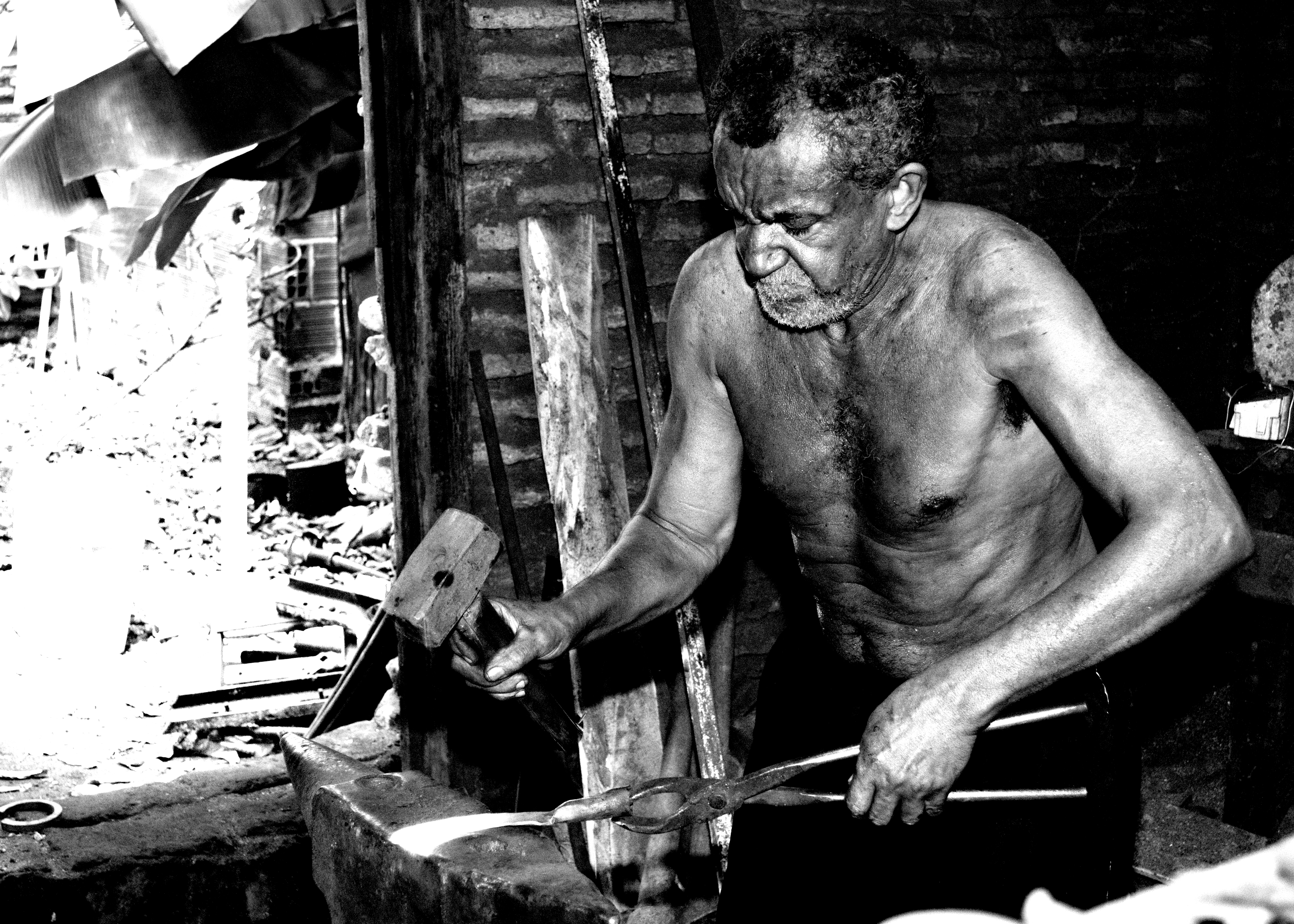 Fotografia de um ferreiro em sua atividade.